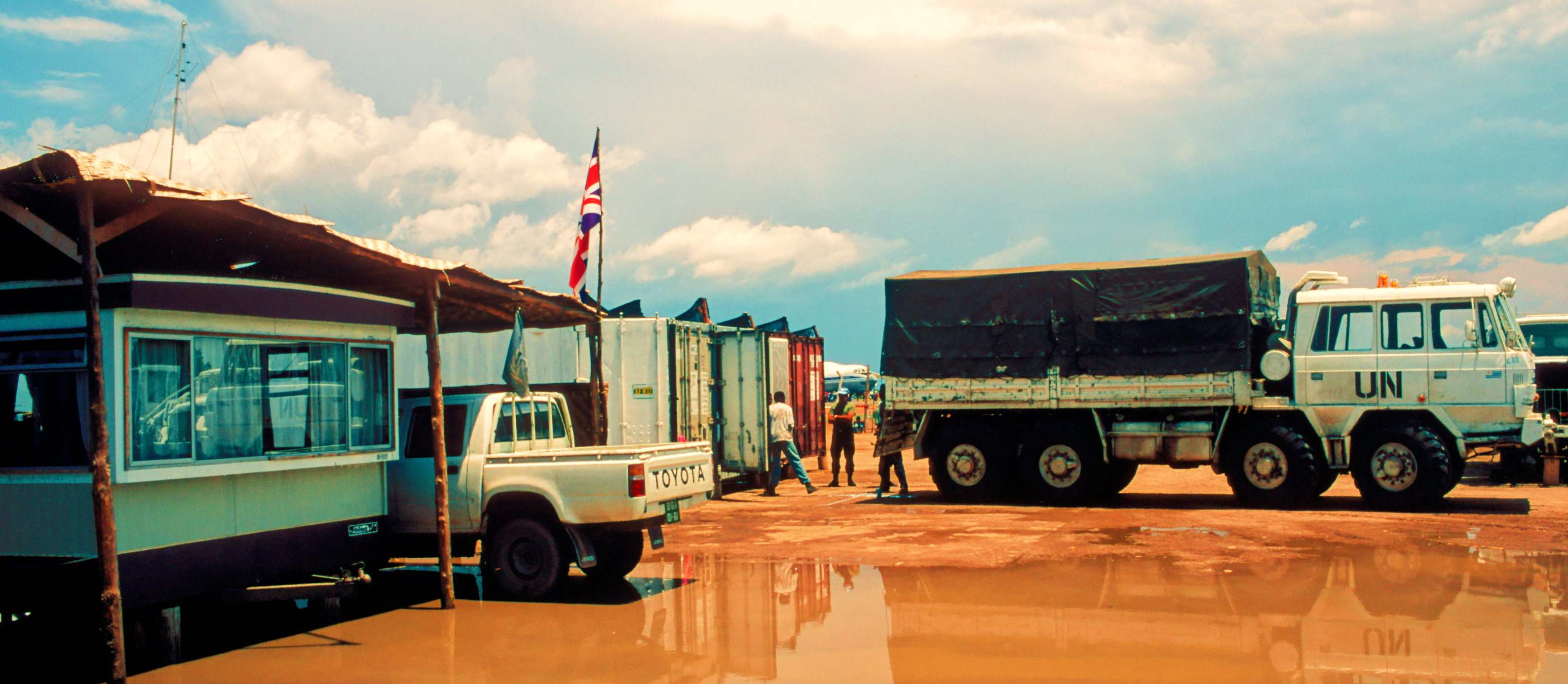 Airport WH, Huambo, Angola